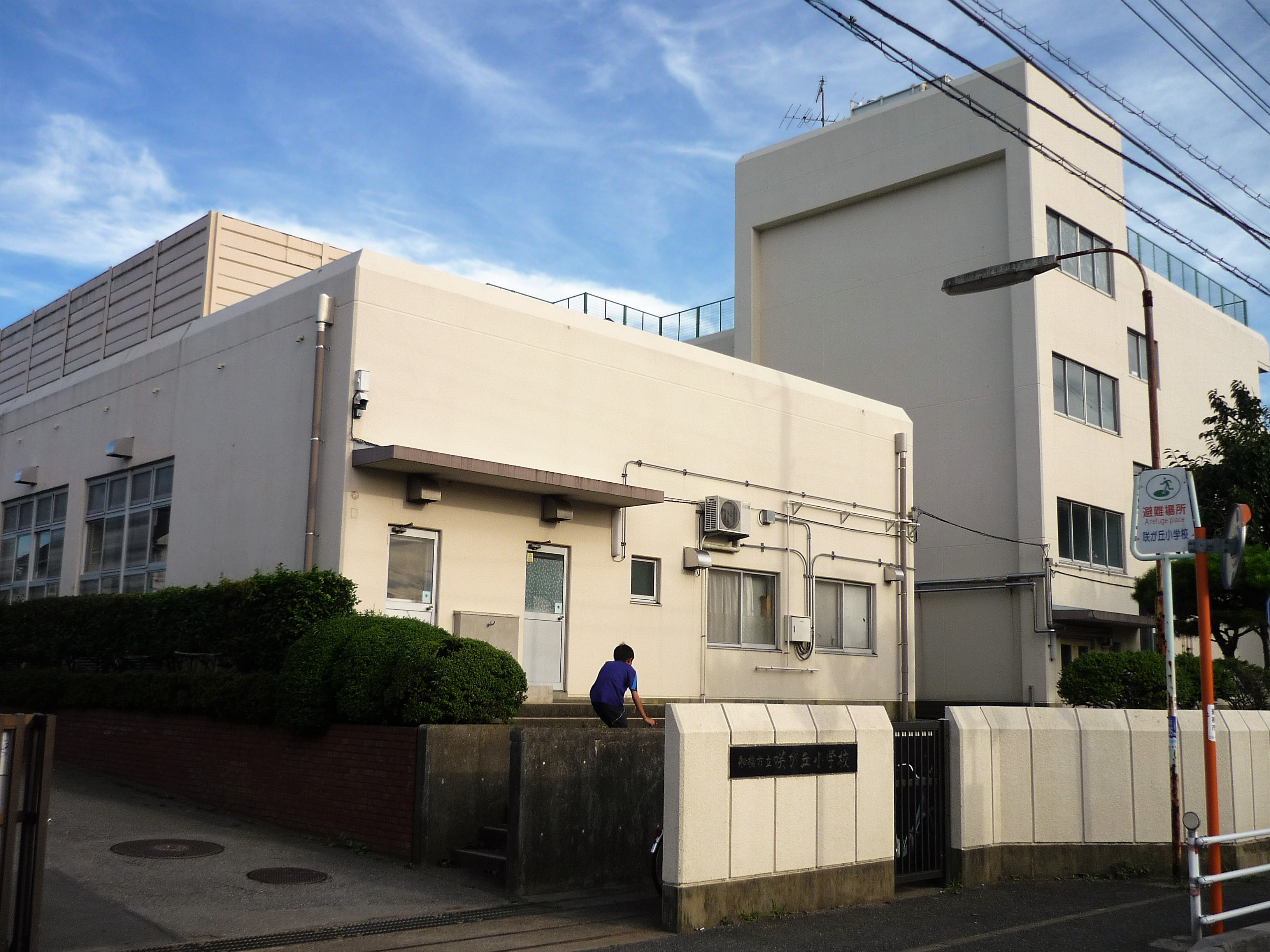 船橋市立咲が丘小学校（正門）